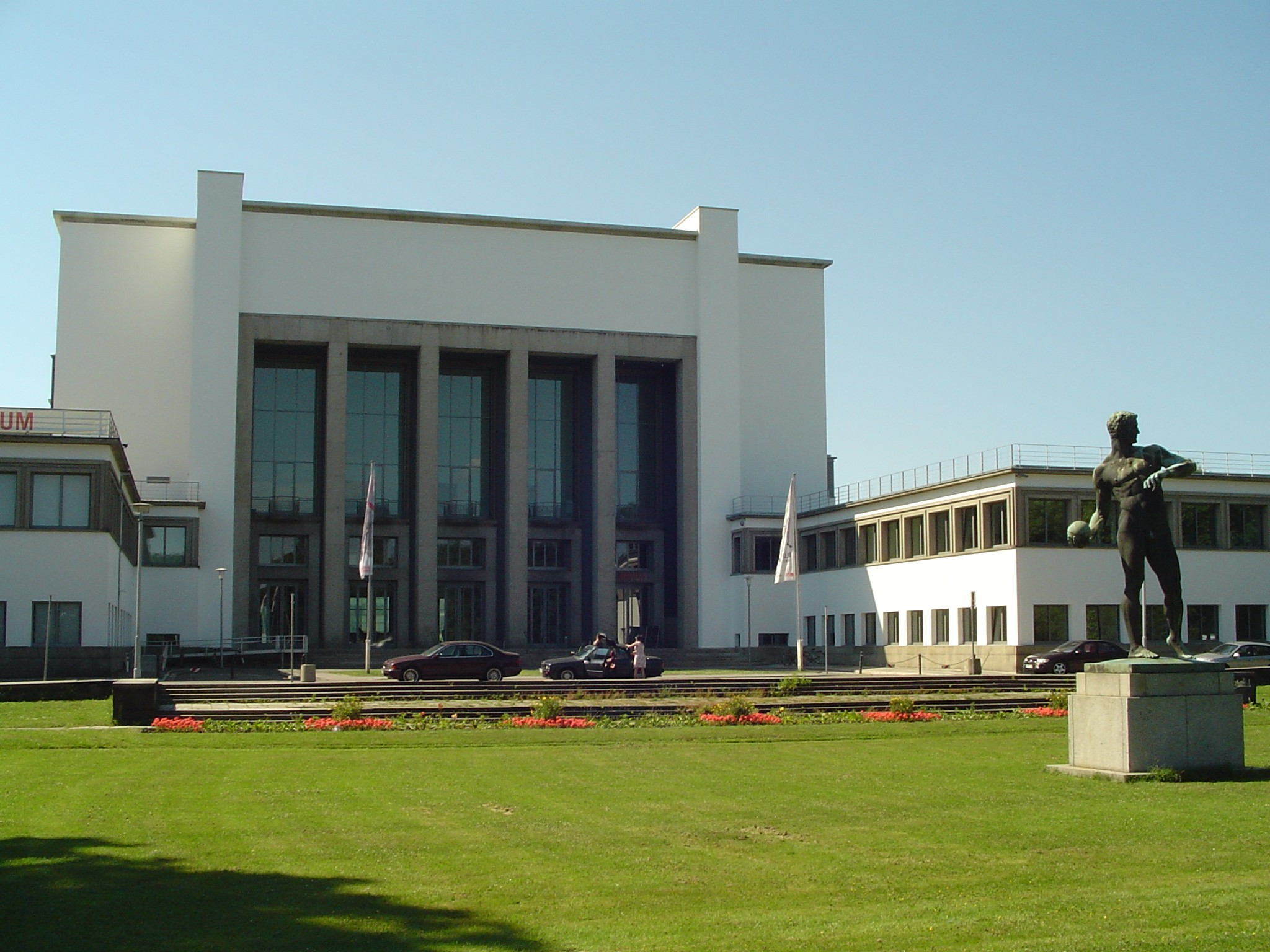 Deutsches Hygiene-Museum in Dresden. Architekt: Wilhelm Kreis